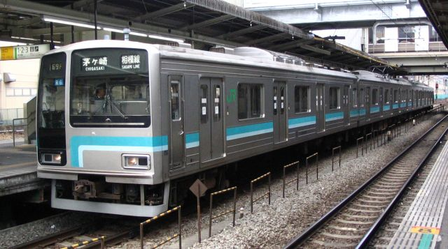 国鉄205系電車相模線仕様（500番台） 撮影者:利用者:Sphl 撮影日:2005年2月26日 撮影地:橋本駅